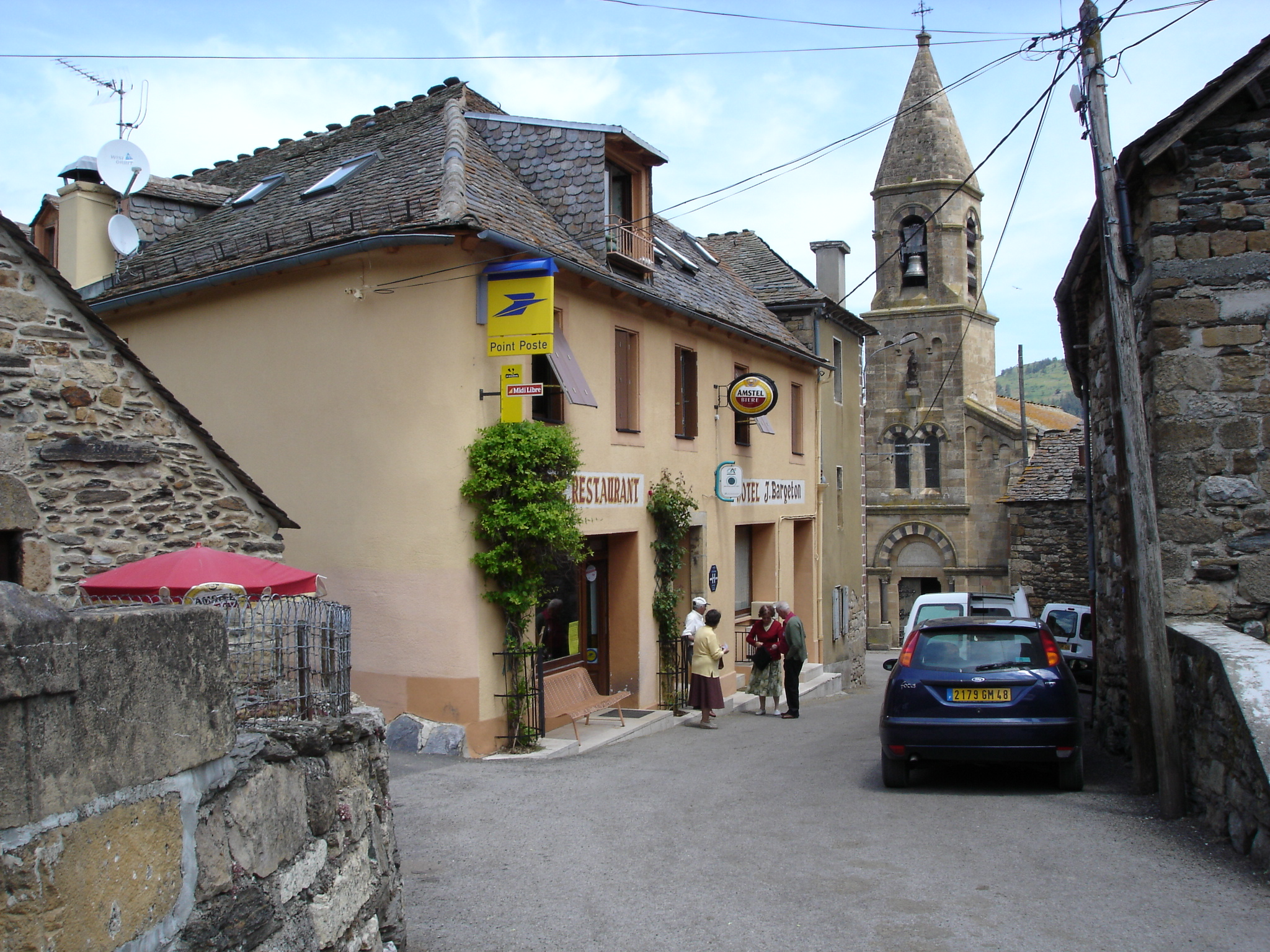 Le centre du village de Cubières (Lozère, Languedoc-Roussillon, France).